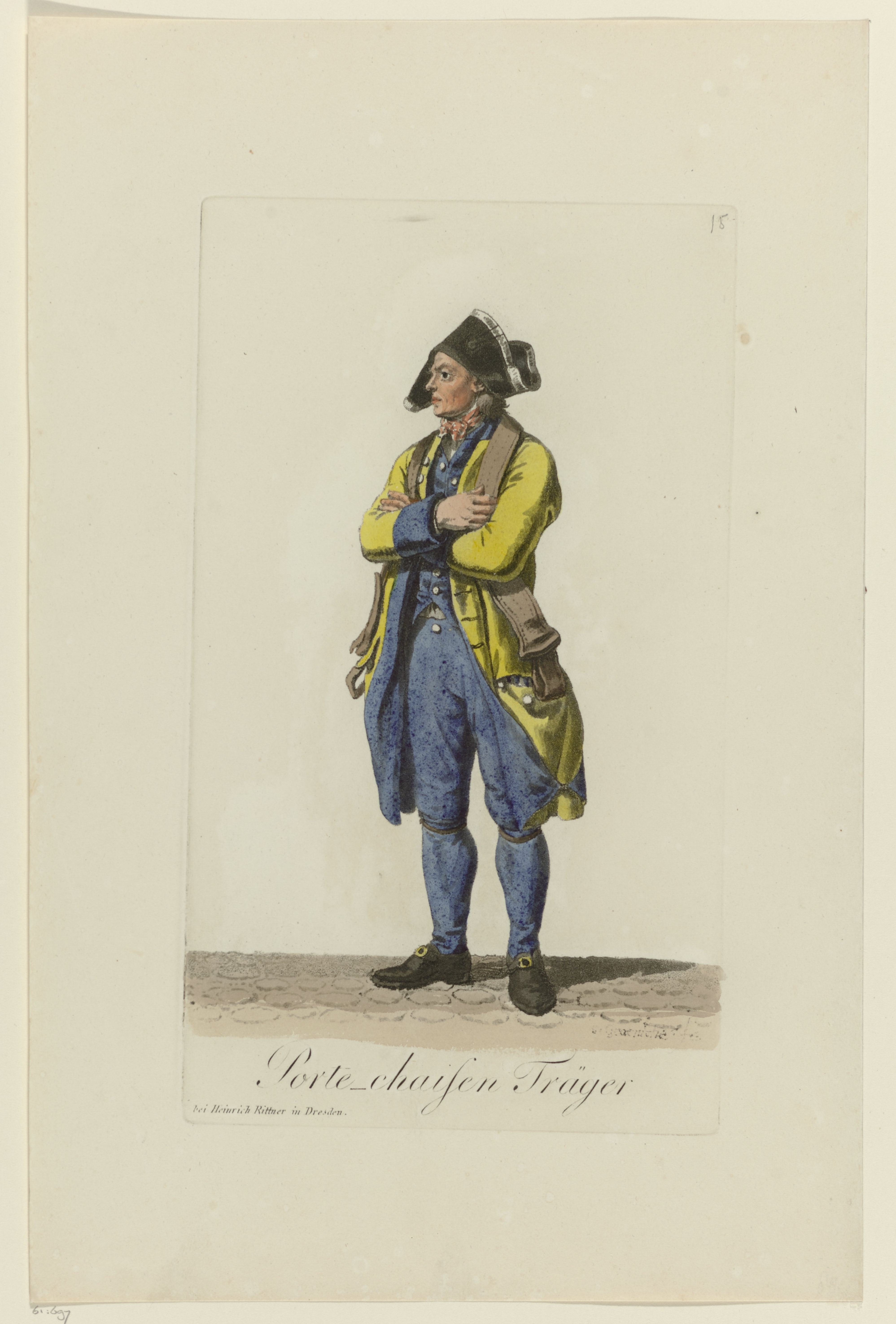 IdentificatieTitel(s): Kostuum van een draagstoel dragerPorte-chaisen Träger (titel op object)Saksische kostuums (serietitel)Objecttype: prent Serienummer: 15/?Objectnummer: RP-P-1961-697Opschriften / Merken: verzamelaarsmerk, verso, gestempeld: Lugt 2228VervaardigingVervaardiger: prentmaker: Samuel Gränicher (vermeld op object)uitgever: Heinrich Rittner (vermeld op object)Plaats vervaardiging: DresdenDatering: 1803 - 1808Fysieke kenmerken: ets en aquatint, met de hand gekleurdMateriaal: papier Techniek: aquatint / etsen / met de hand kleurenAfmetingen: plaatrand: h 248 mm × b 143 mmOnderwerpWat: folk costume, regional costume(carrying a person in a) sedan-chairWaar: SaksenVerwerving en rechtenVerwerving: overdracht van beheer 1961Copyright: Publiek domein